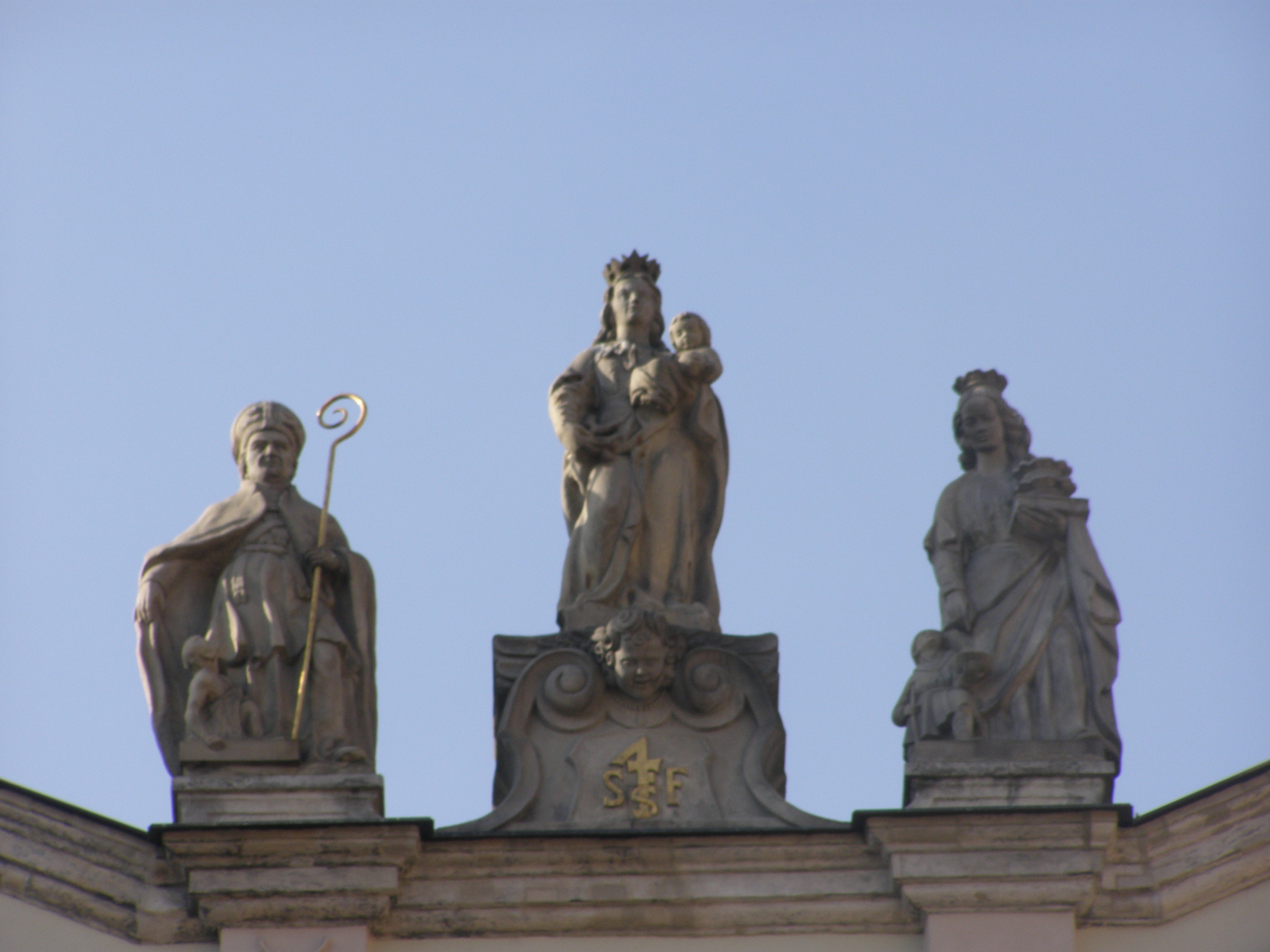 Attyka na Kamienicy Falkiewicza